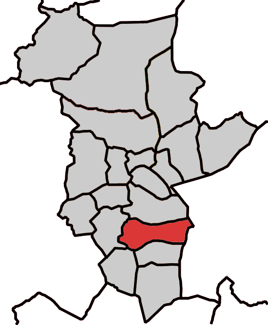 Situación da parroquia de Corvite no concello de Abadín